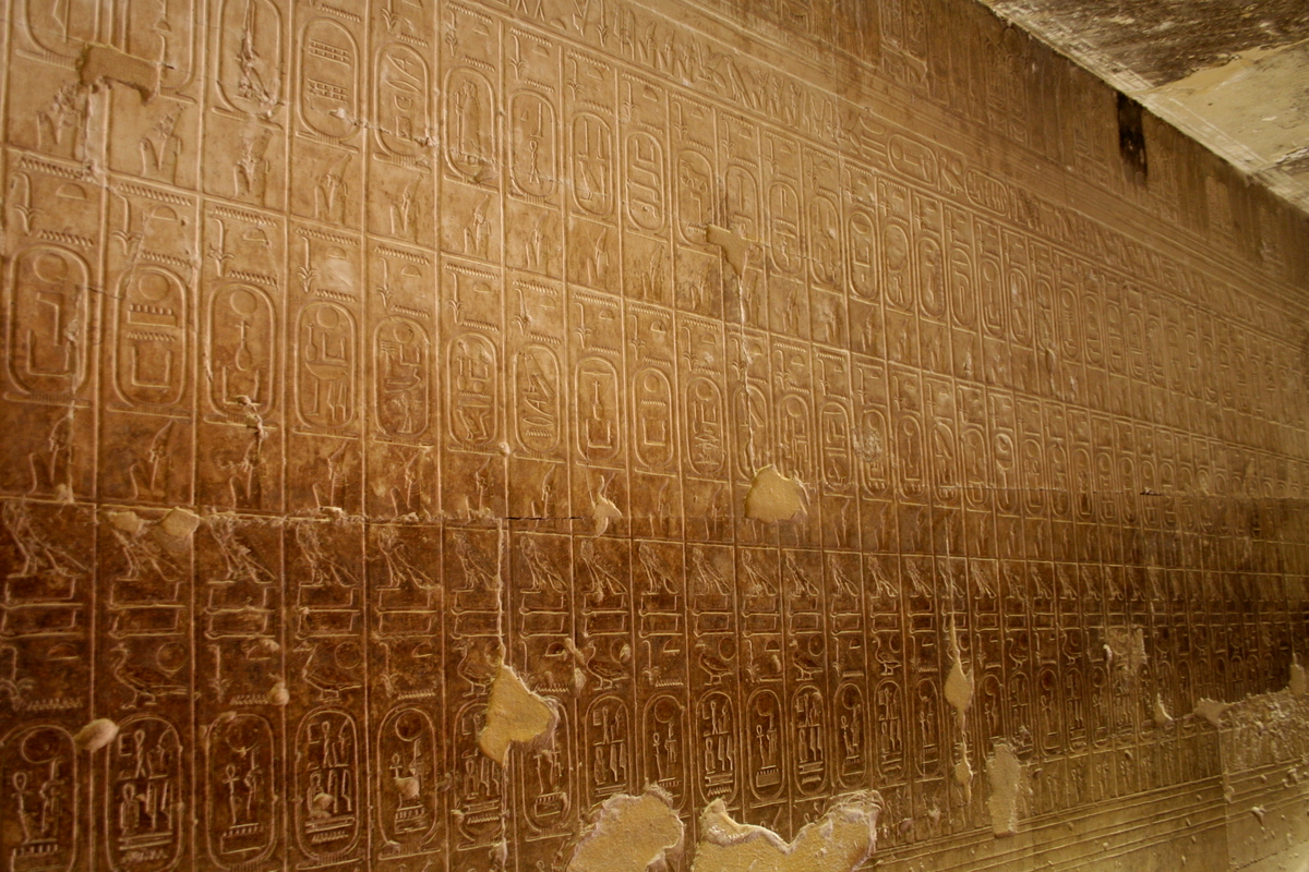 Temple d'Abydos, liste des rois d'Egypte